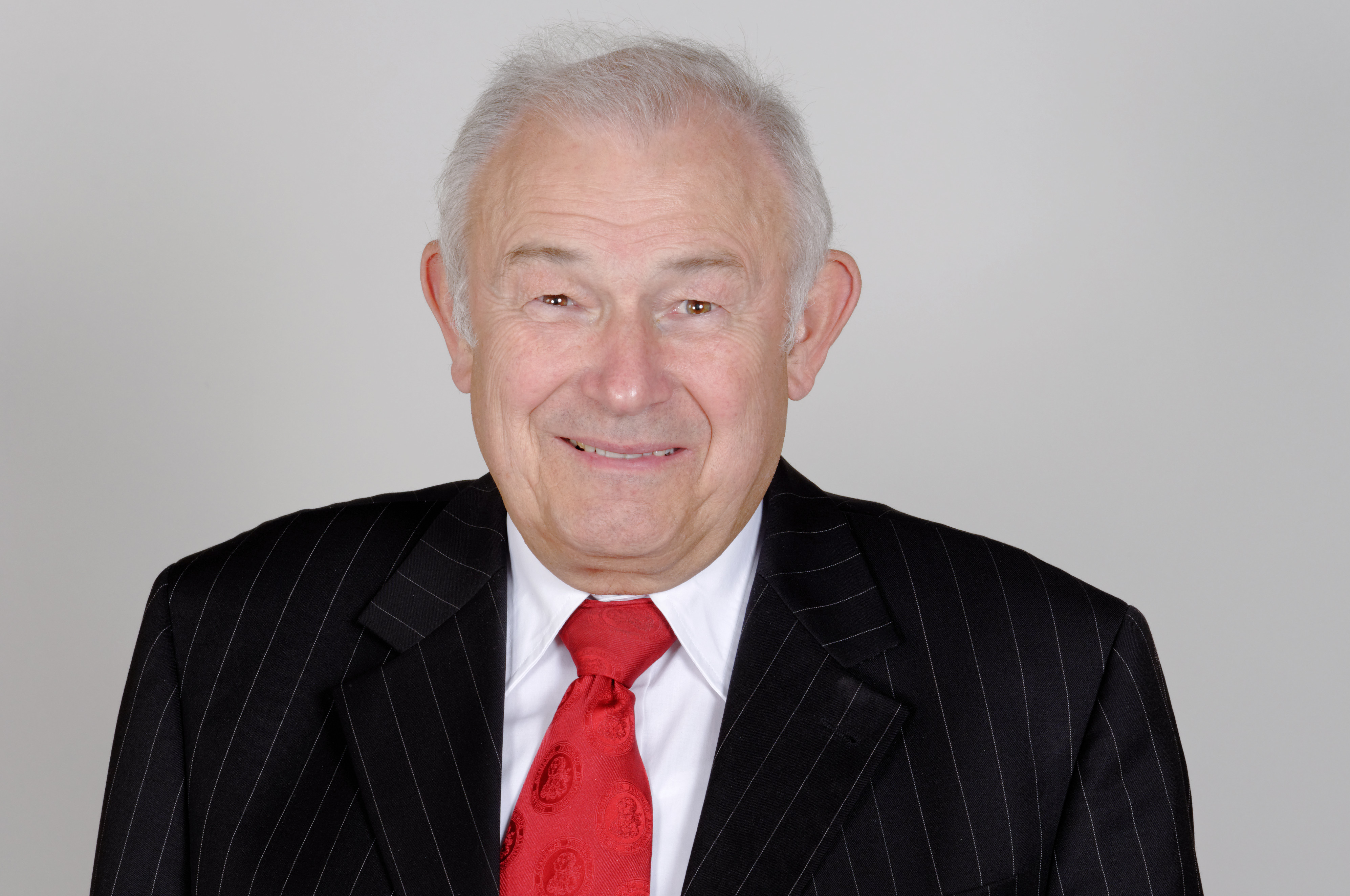 Landtagsprojekt Bayern